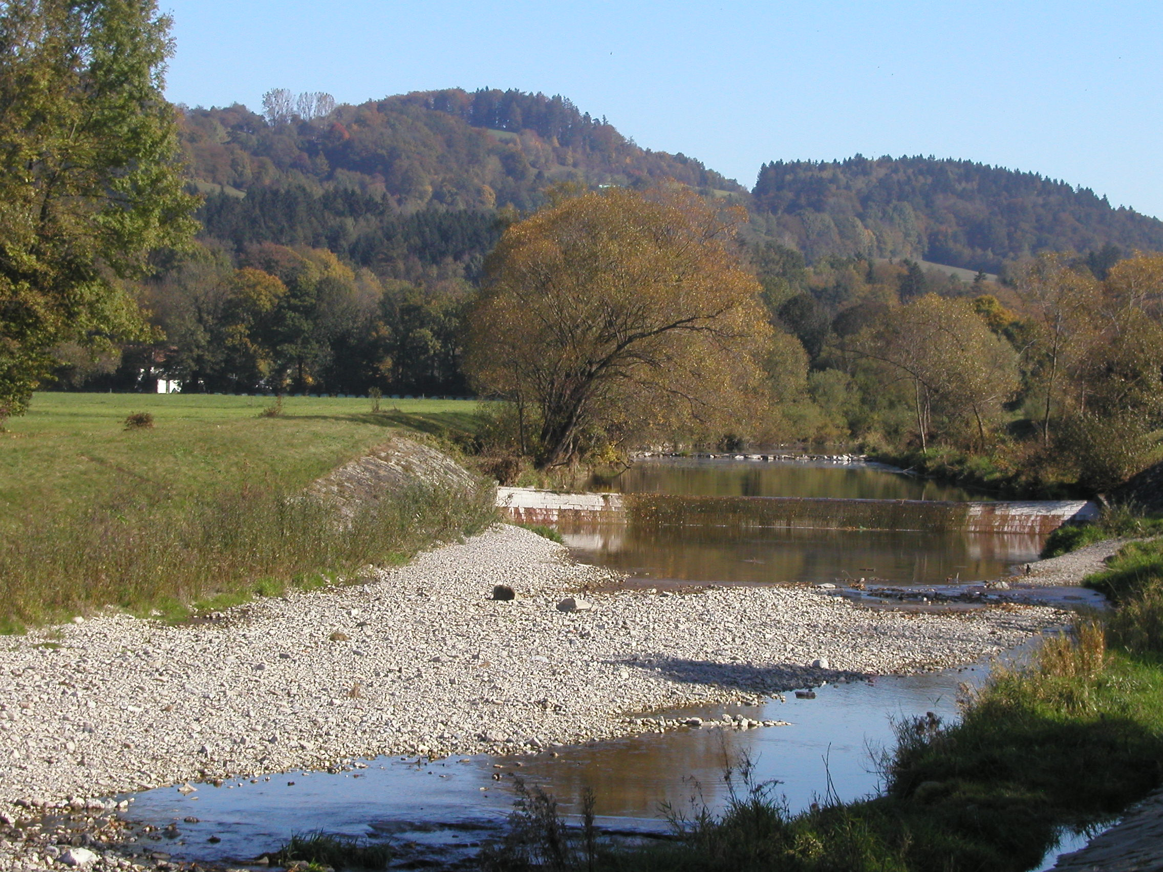 Schotterbänke der Gölsen, Niederösterreich.